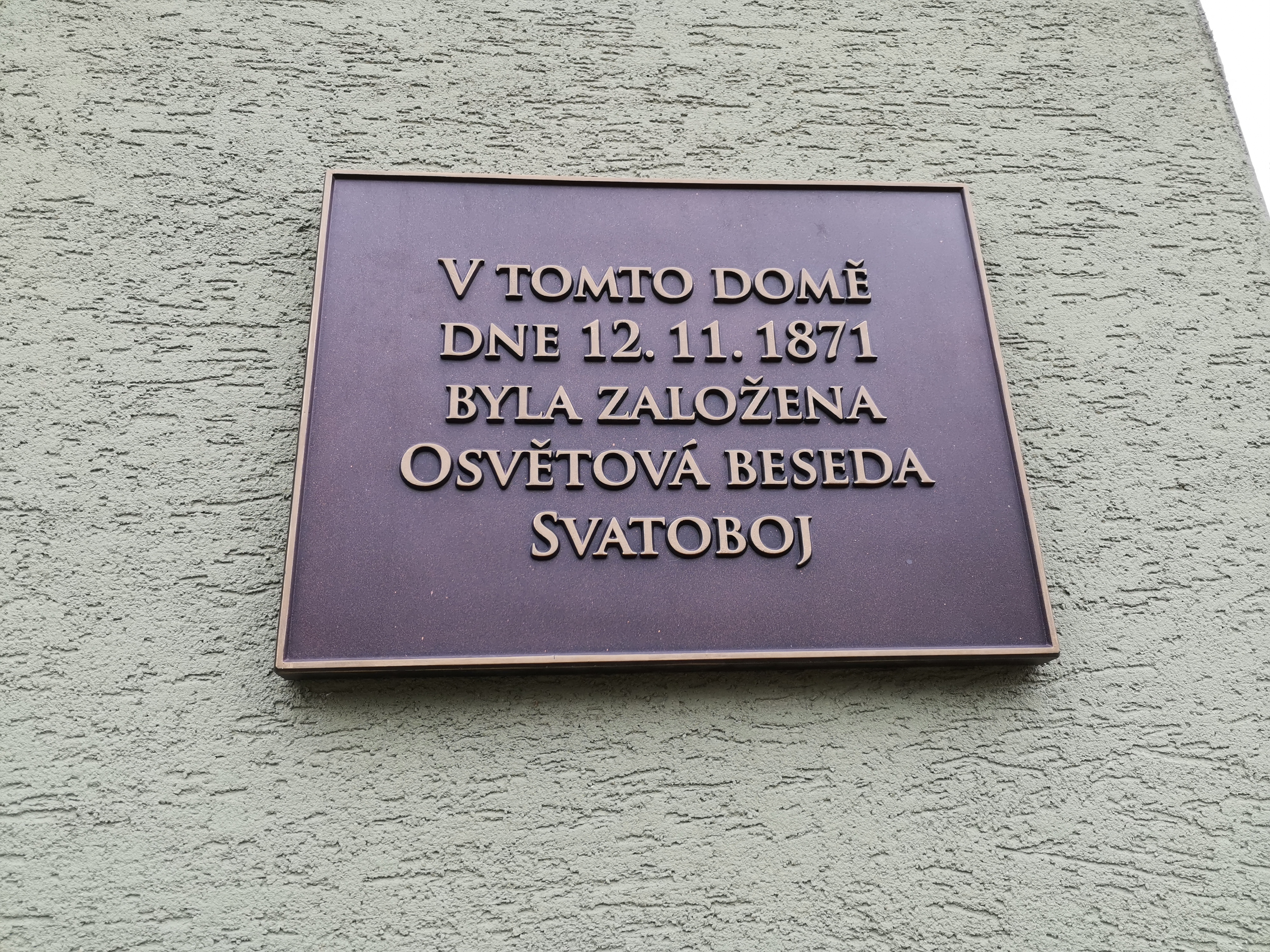 Pamětní deska o založení Osvětové besedy Svatoboj na budově bývalého divadla